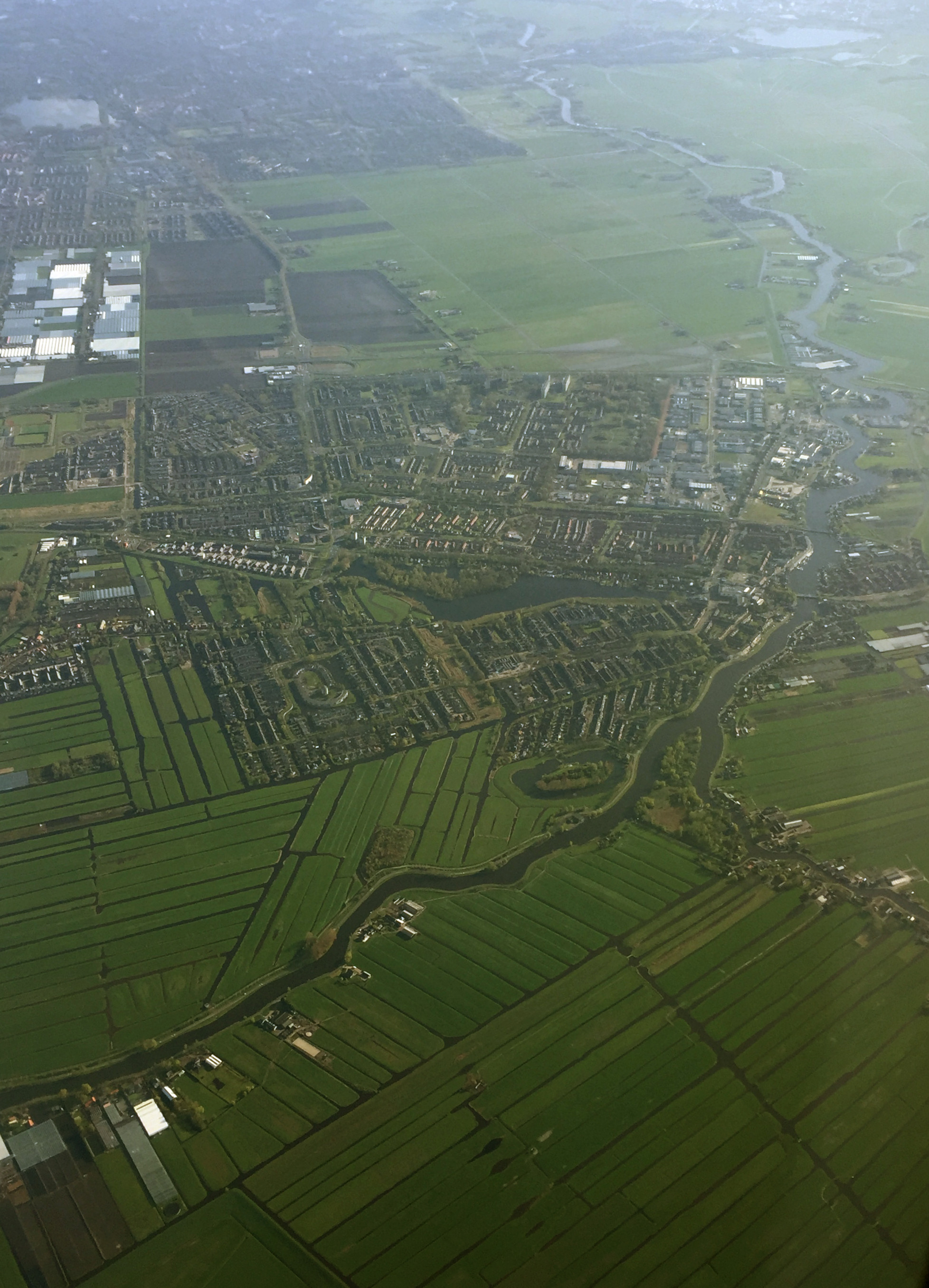 Uithoorn gezien naar het noorden, april 2016